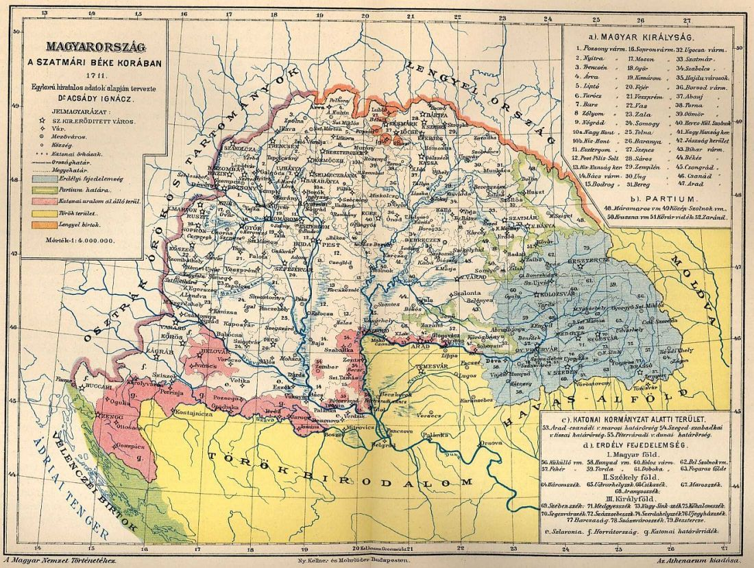 Magyarország a szatmári béke korában, 1711-ben. Egykorú hivatalos adatok alapján tervezte dr. Acsády Ignácz